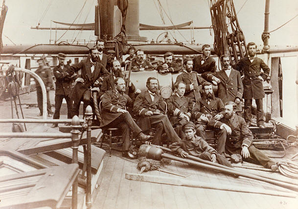 Fotografía de la oficialidad de la corbeta Abtao durante la guerra del Pacífico: La oficialidad de la corbeta “Abtao”. De pie tras el cañón, desde la izquierda, ingenieros Pablo Rebolledo y Juan Mery, contador Eleodoro Davenport, guardiamarina Pedro N. Martínez y contador Malcolm Mac-Iver. Fila del centro: apoyado en el cañón, teniente 2º Policarpo Toro; sentado, cirujano Pedro V. O’Ryan; guardiamarinas Luis Artigas y Fernando Gómez. Primera fila sentados: tenientes 2º Carlos Krüg y Leoncio Señoret; comandante capitán de fragata, Aureliano T. Sánchez; guardiamarinas José Luis Silva Lastarria y Patricio Aguayo.(